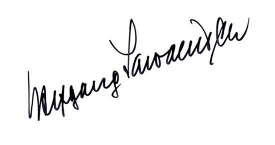 podpis Wolfganga Sawallische